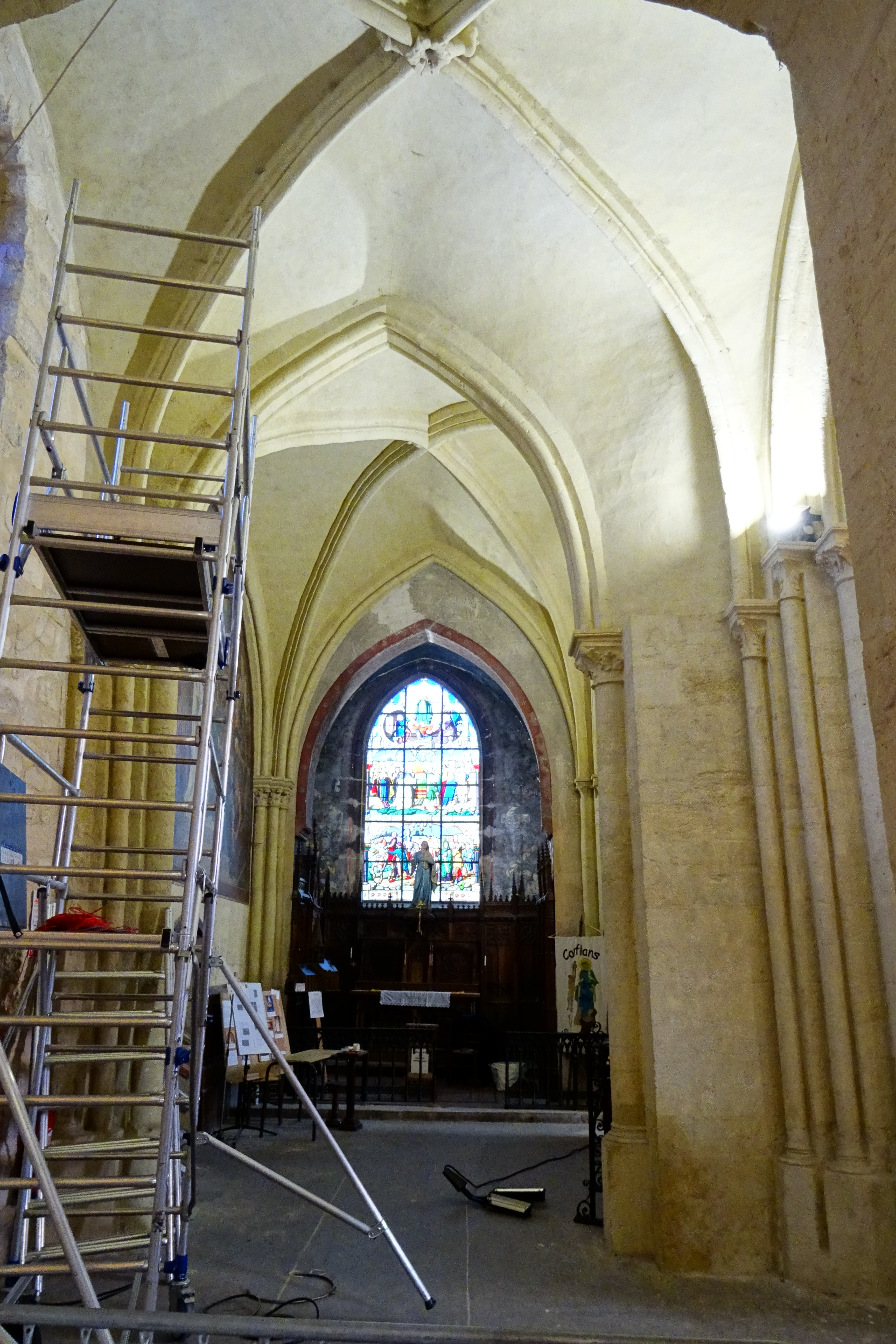 Intérieur de l'église - voir le titre du fichier.